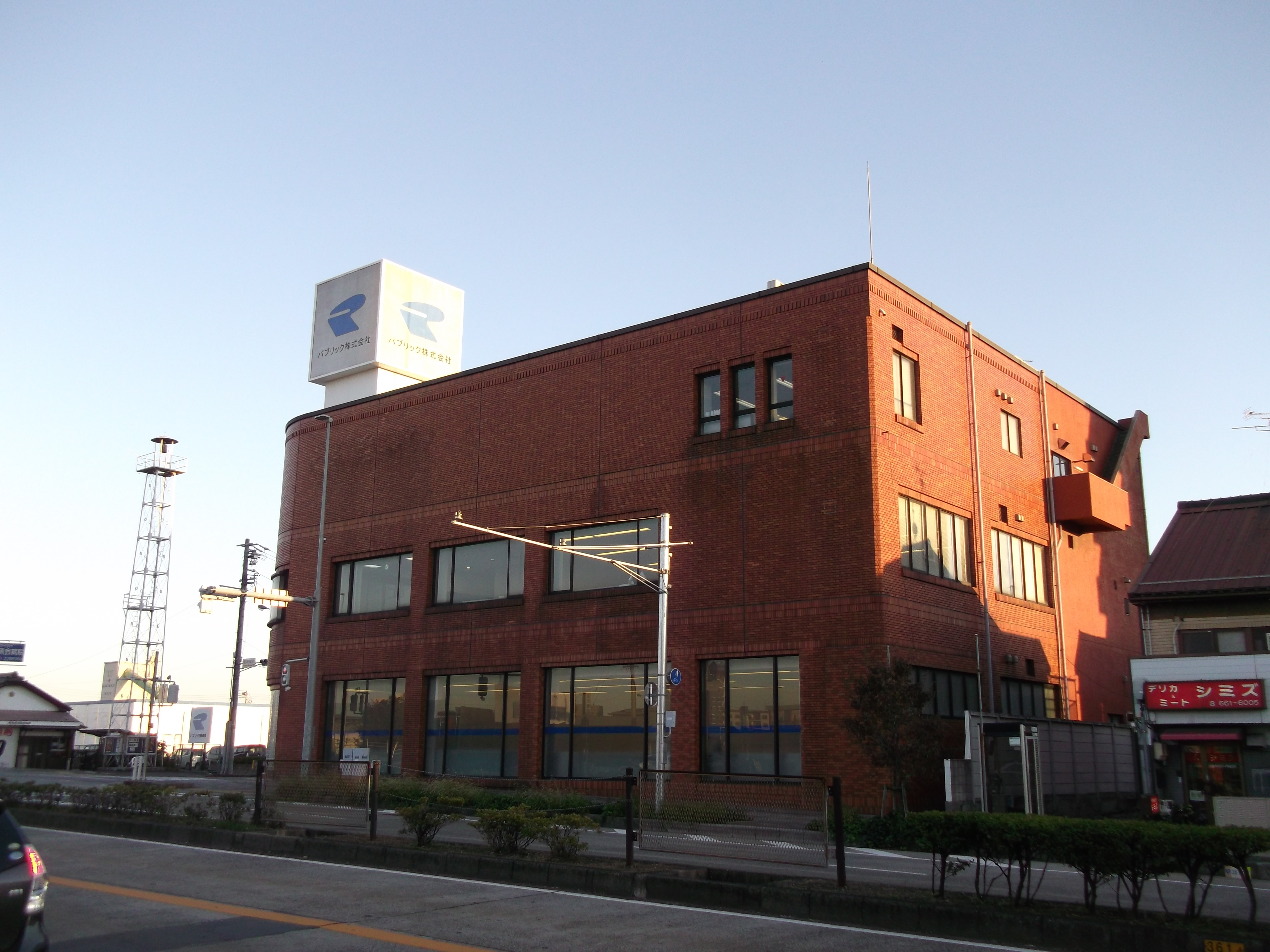 名古屋市中川区福船町のパブリック本社を北側公道西側より撮影